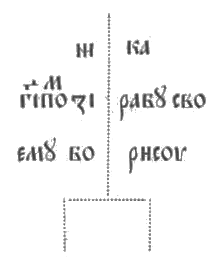 Прорисовка надписи на Борисовом камне в Дисне (первом).